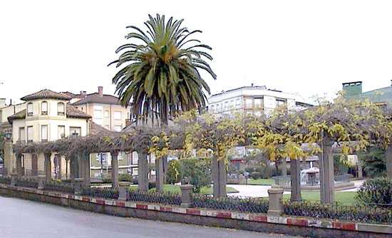 Fotografía de los Jardines de José Antonio en Noreña.